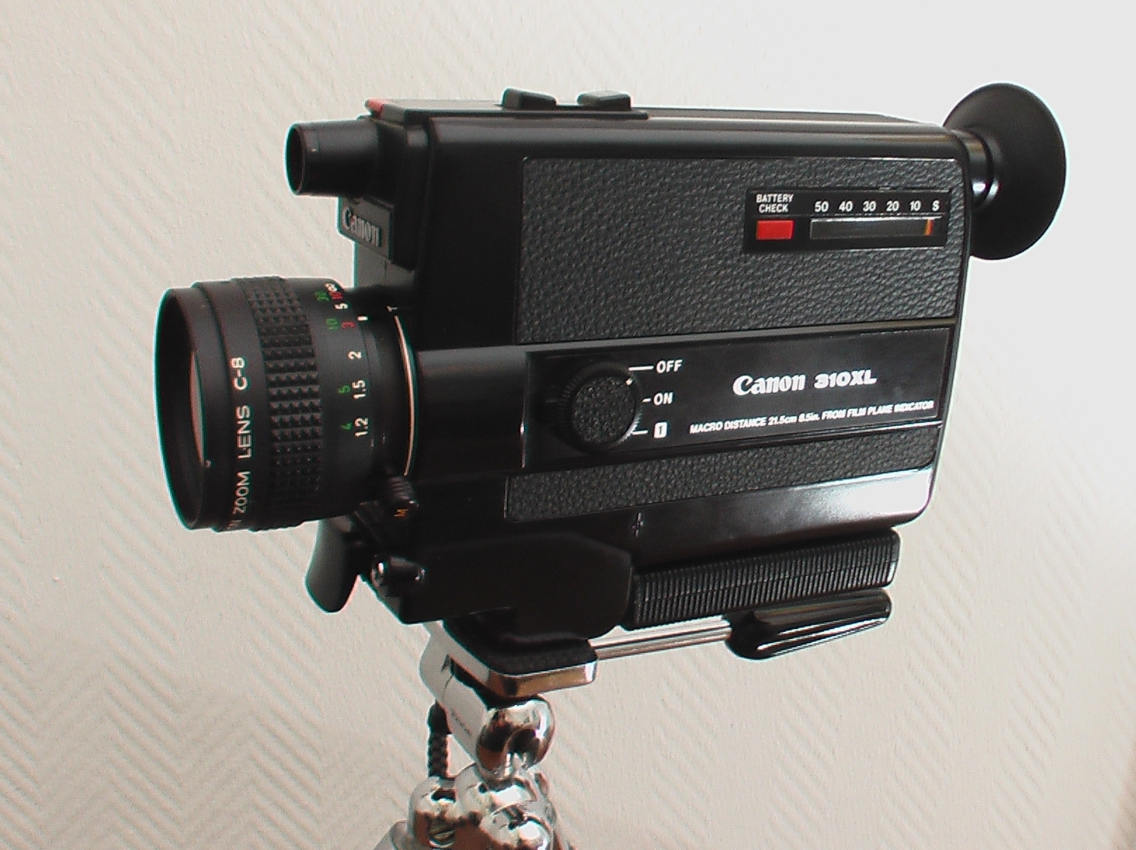 Super8KameraCanon310XL